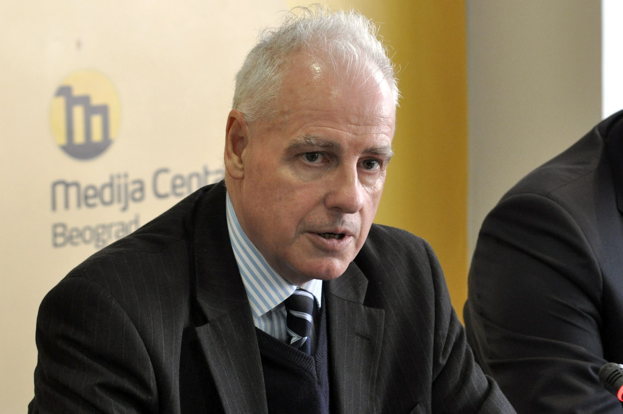 Хајнц Вилхелм немачки дипломата